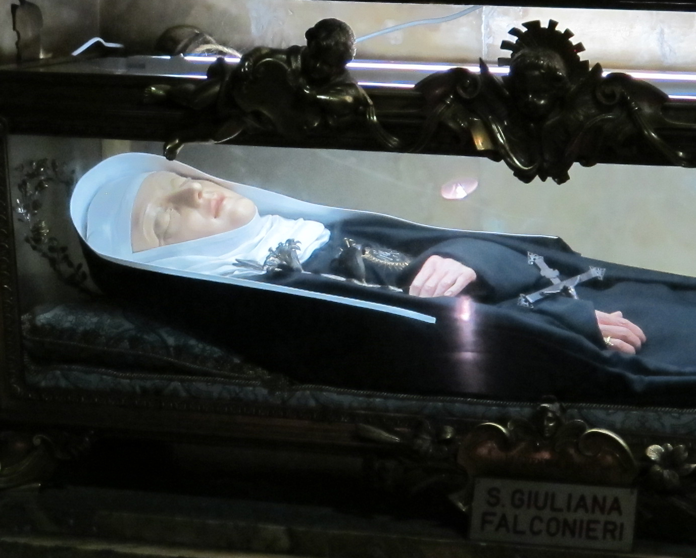 Annunziata, reliquie della beata giuliana falconieri